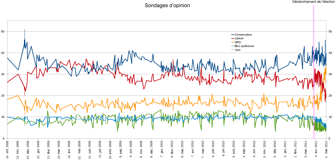 Les sondages d'opinion qui ont mené à la élection fédérale canadienne de 2011.